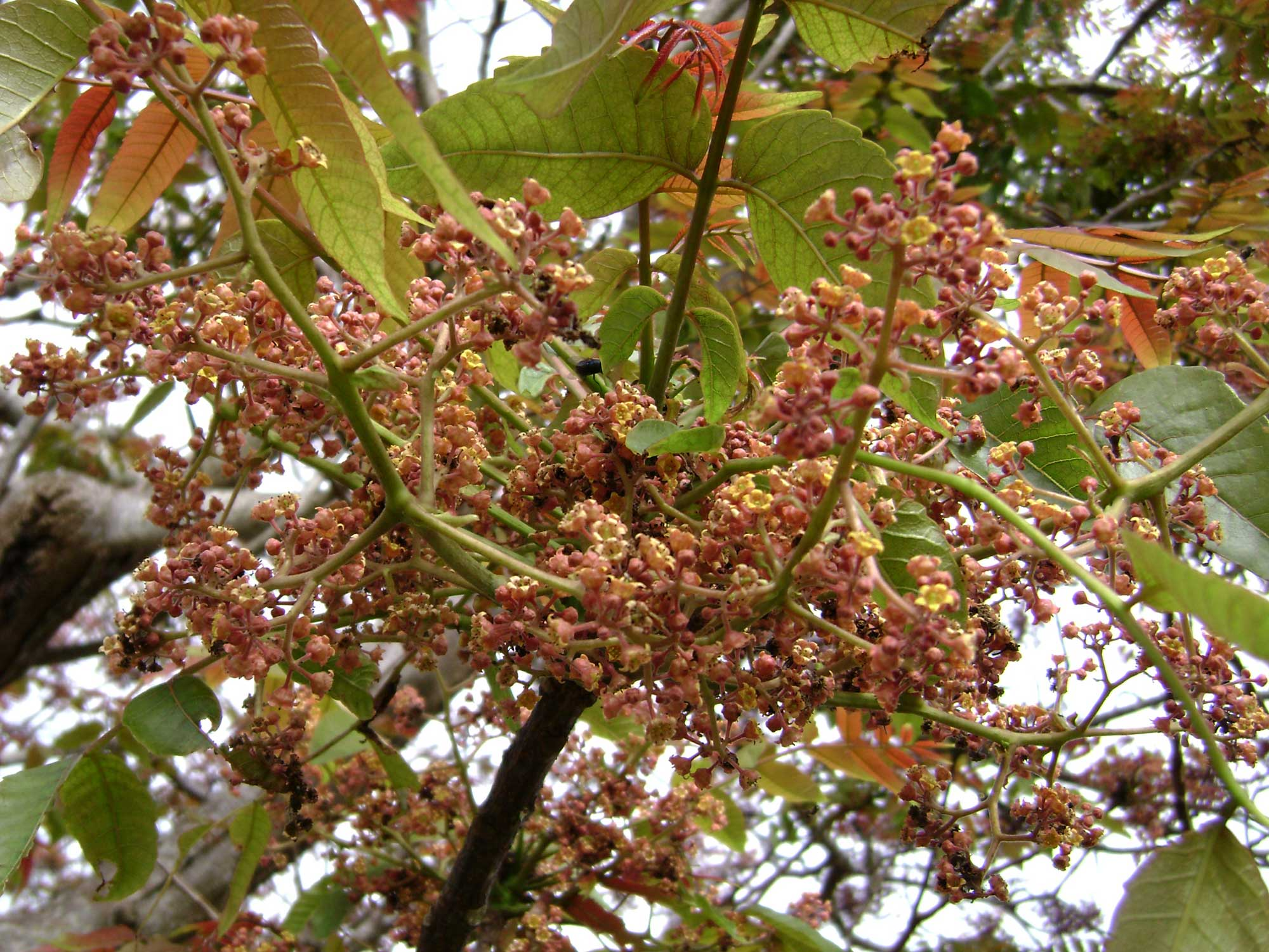 Garuga floribunda, (manaui), flowering in Vavaʻu, Tonga